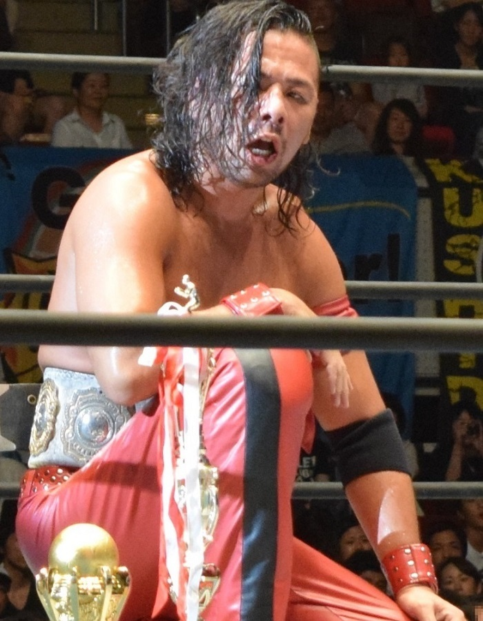 2015年9月27日 ワールド記念ホール「DESTRUCTION in KOBE」 中邑真輔